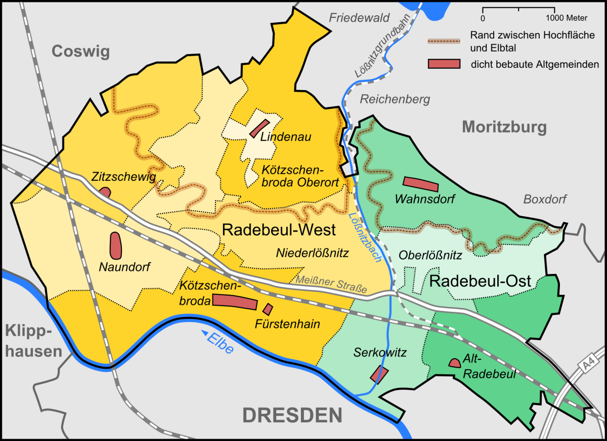 Karte der Stadtteile und Umlandgemeinden Radebeuls